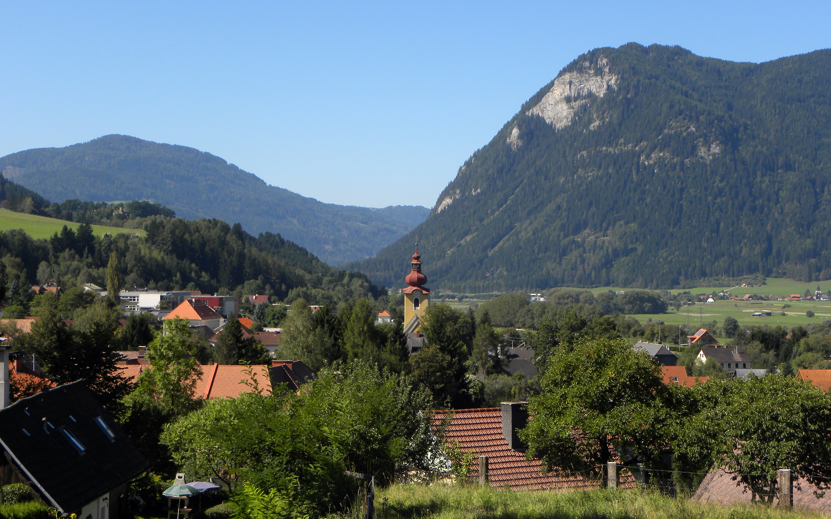 Blick auf Scheifling